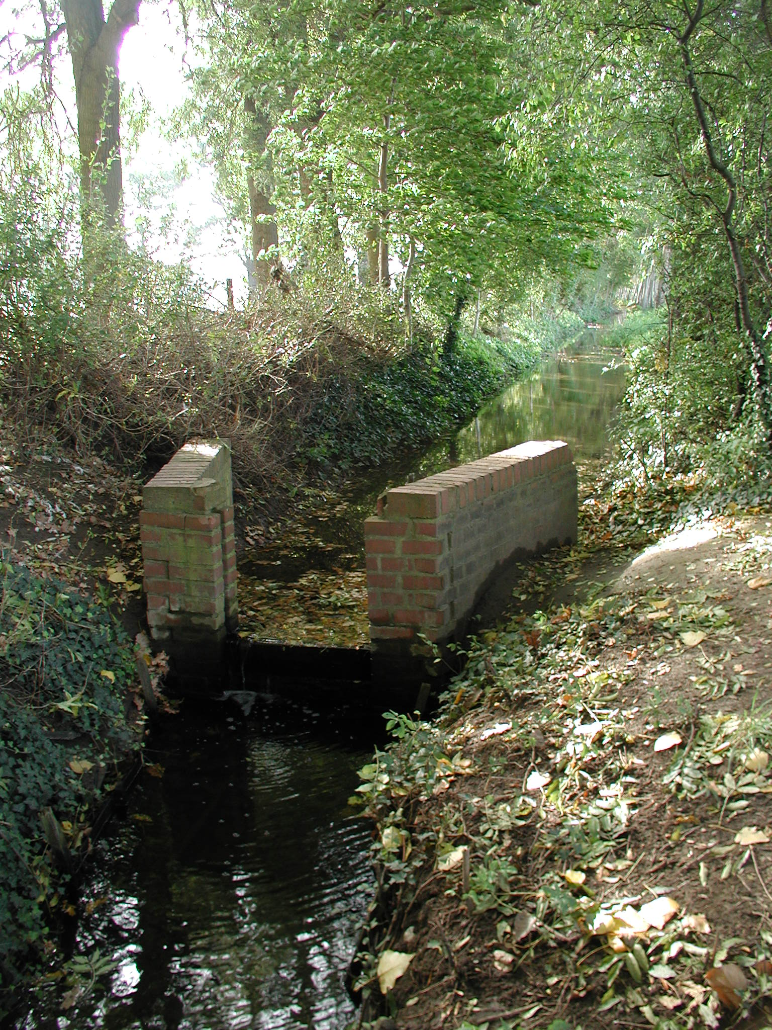 Hürth-Sielsdorf, Verlauf des Gleueler Baches am Ortsrand neben dem Hubertushof